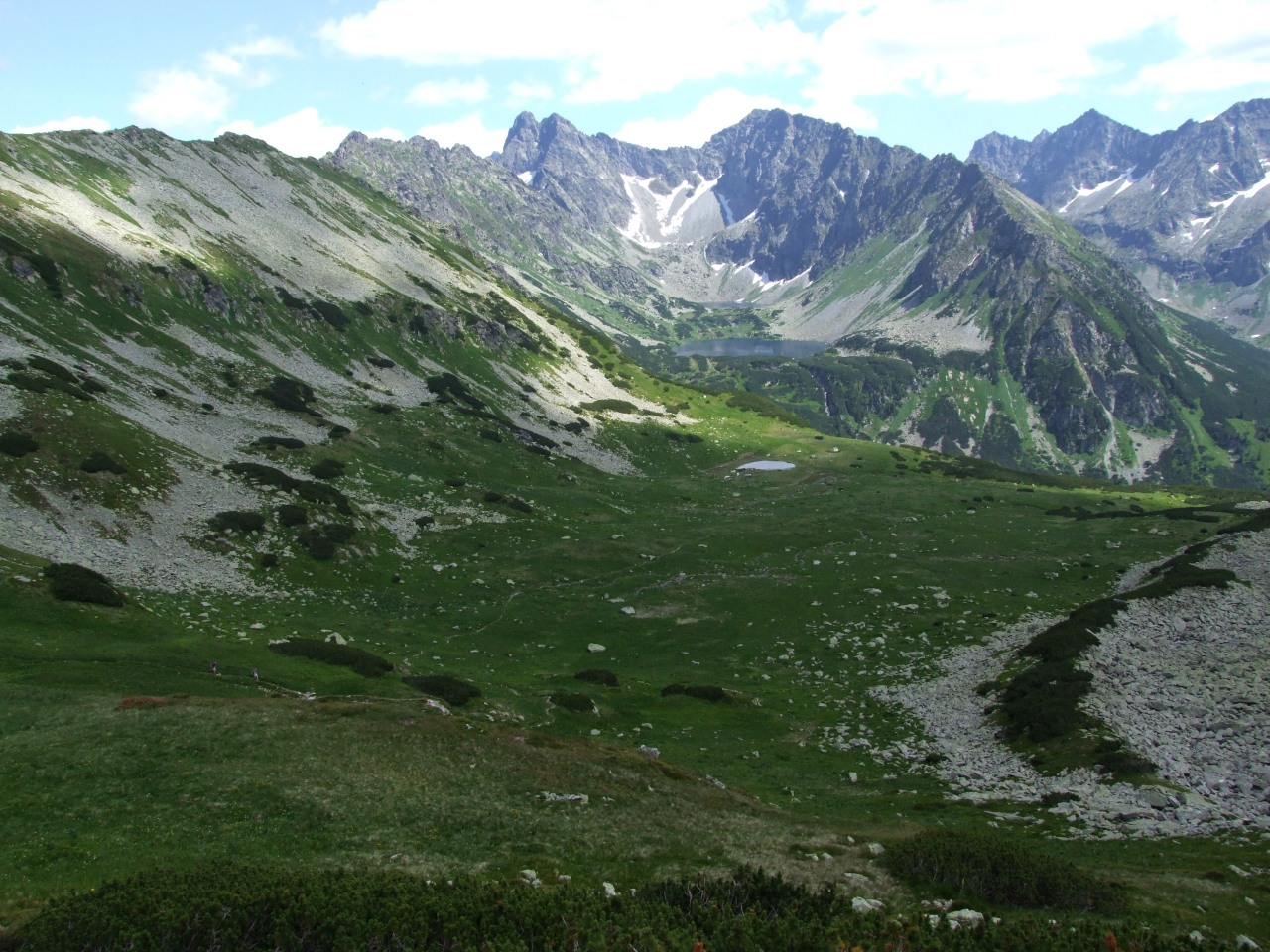 Dolina Kobyla i Kobyli stawek. W głębi Dolina Ciemnosmreczyńska, Mięguszowiecki Szczyt Wielki, Cubryna i Koprowy Wierch oraz część Doliny Hlińskiej